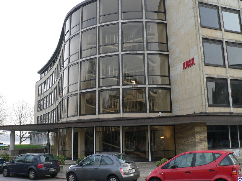 ehemaliges Verwaltungsgebäude IDUNA in Hamburg, Alte Rabenstraße Architekt: Ferdinand Streb